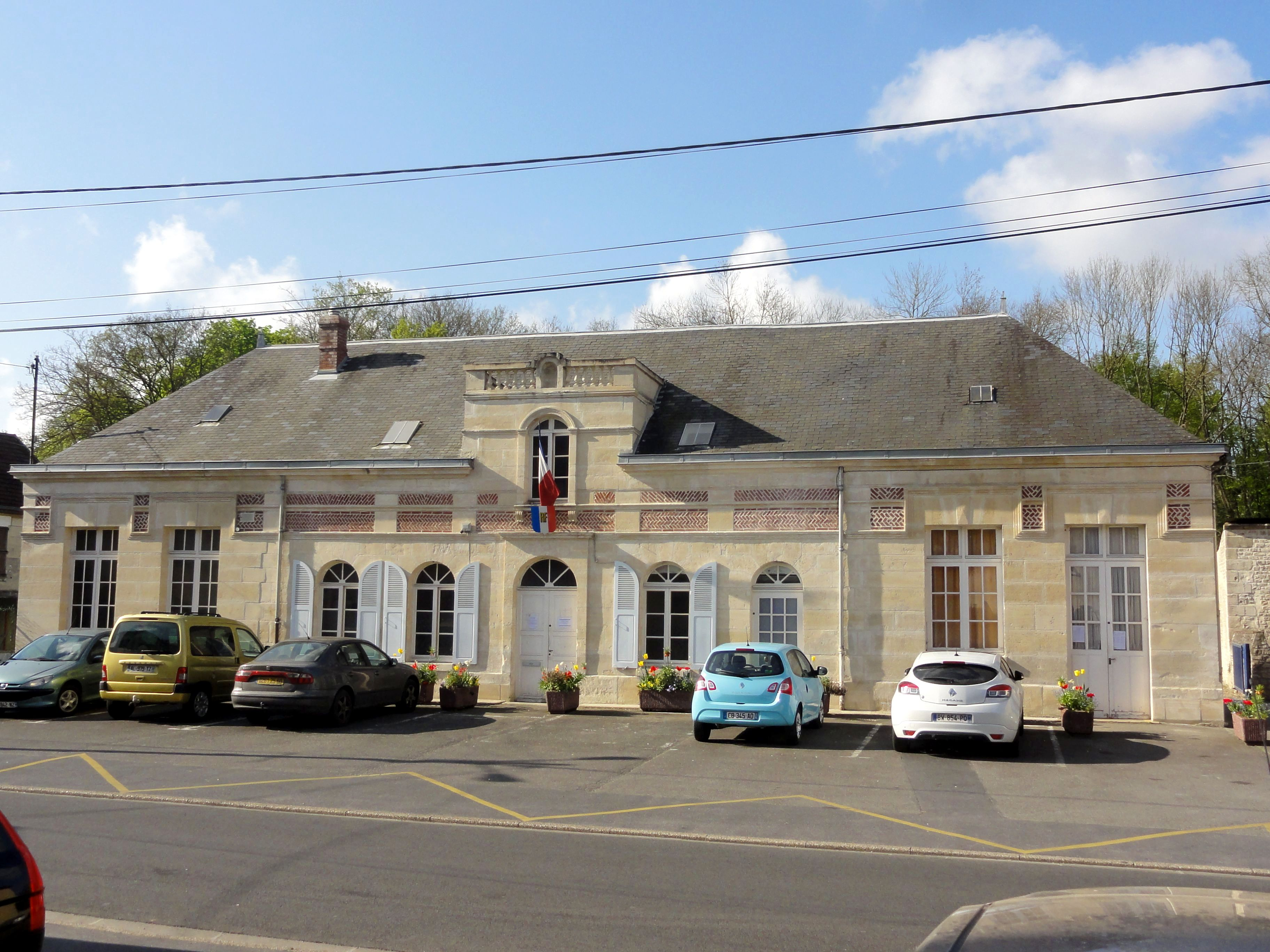 Mairie, côté rue.